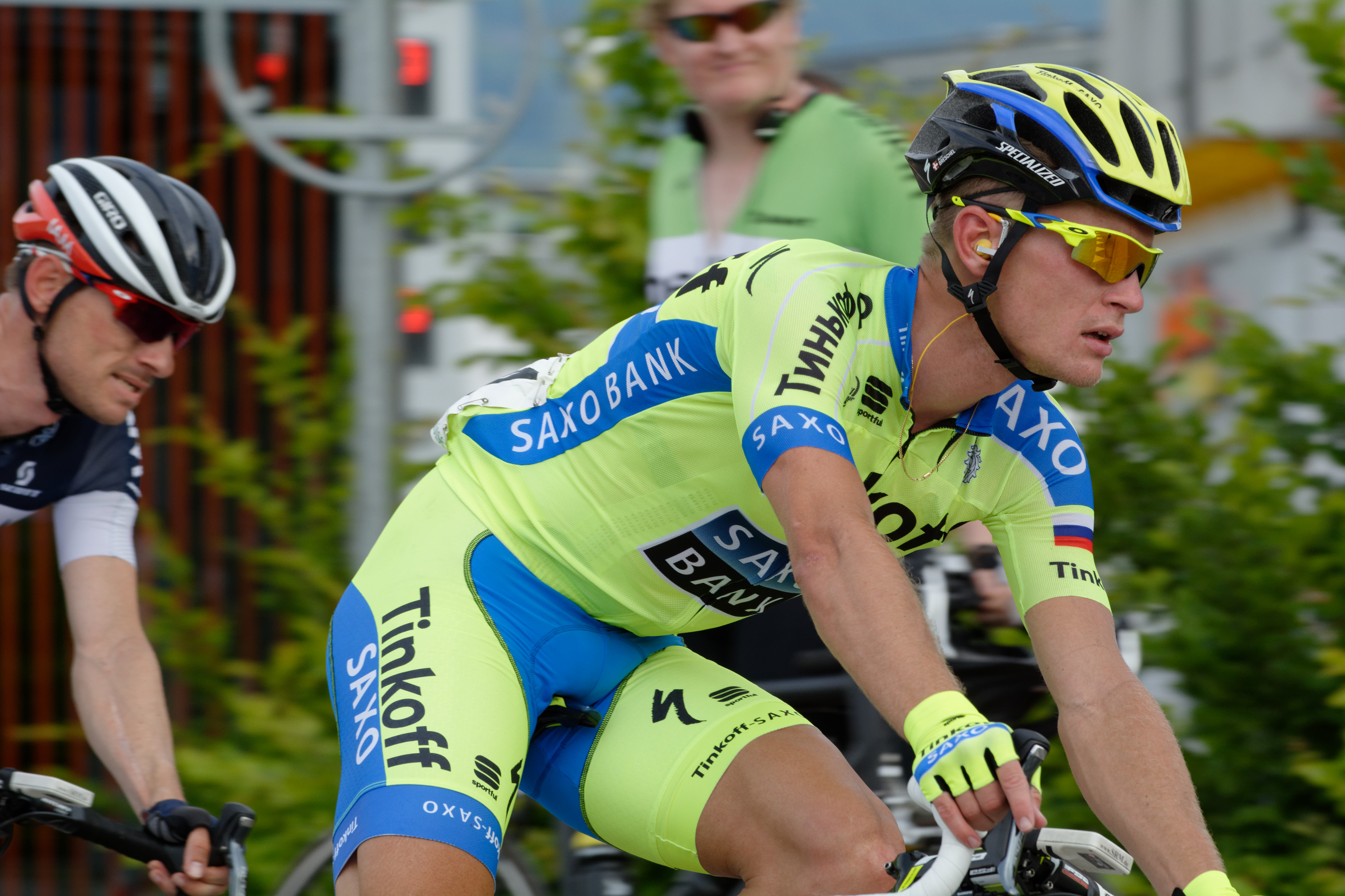 D71_0509_DxO